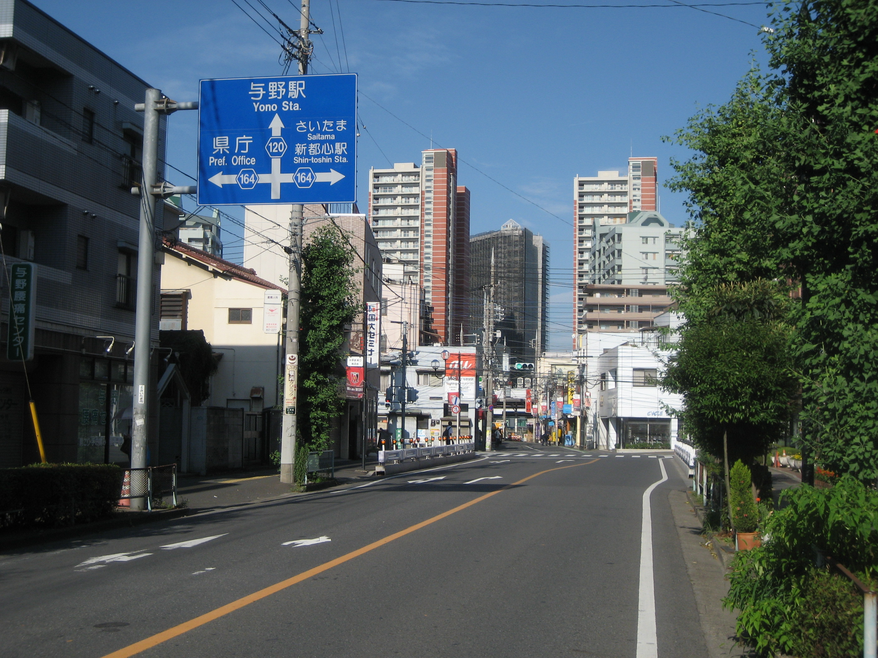 埼玉県道120号線浦和区与野駅東口交差点付近